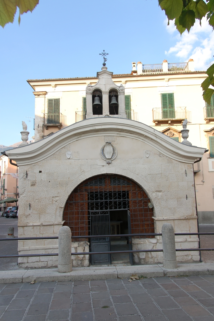 Sulmona 2011